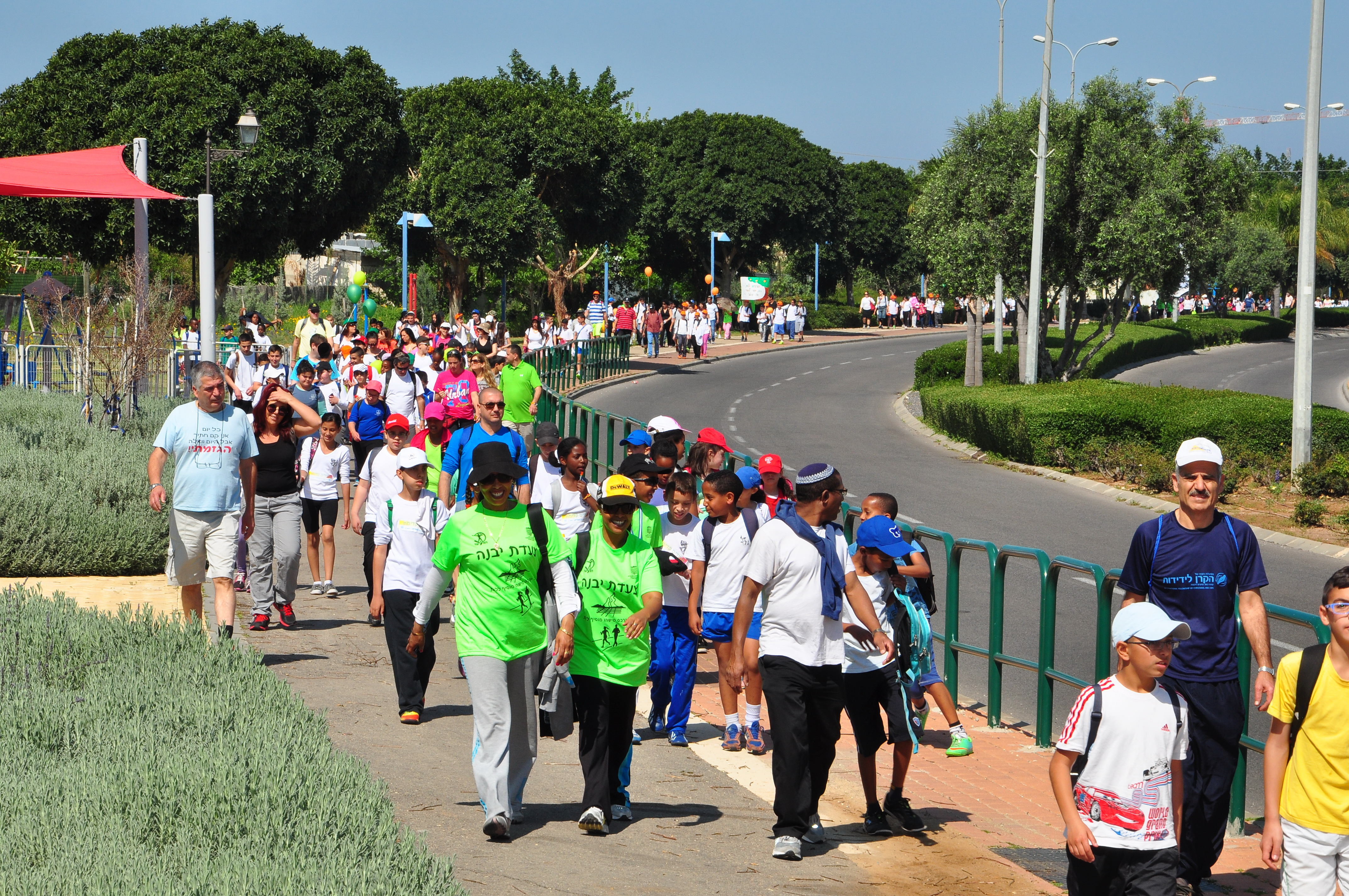 צעדת יבנה, 2015